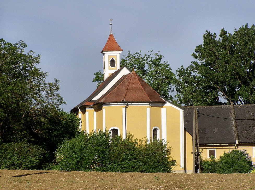 Annabergkirche in der Ortschaft Annaberg, 2,2 km östlich der Ortschaft Alkoven